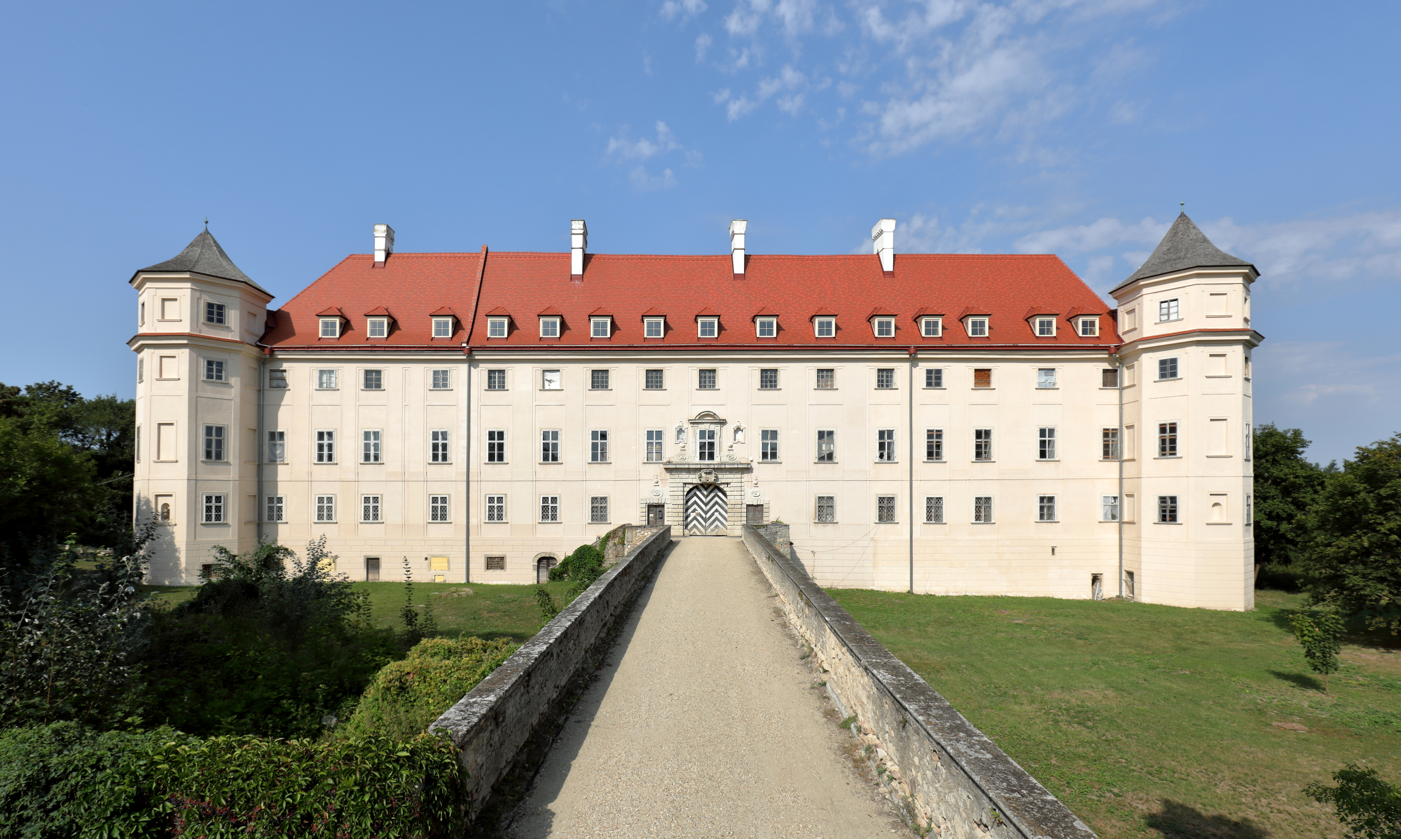 Ostansicht des Schlosses Petronell in der niederösterreichische Marktgemeinde Petronell-Carnuntum.